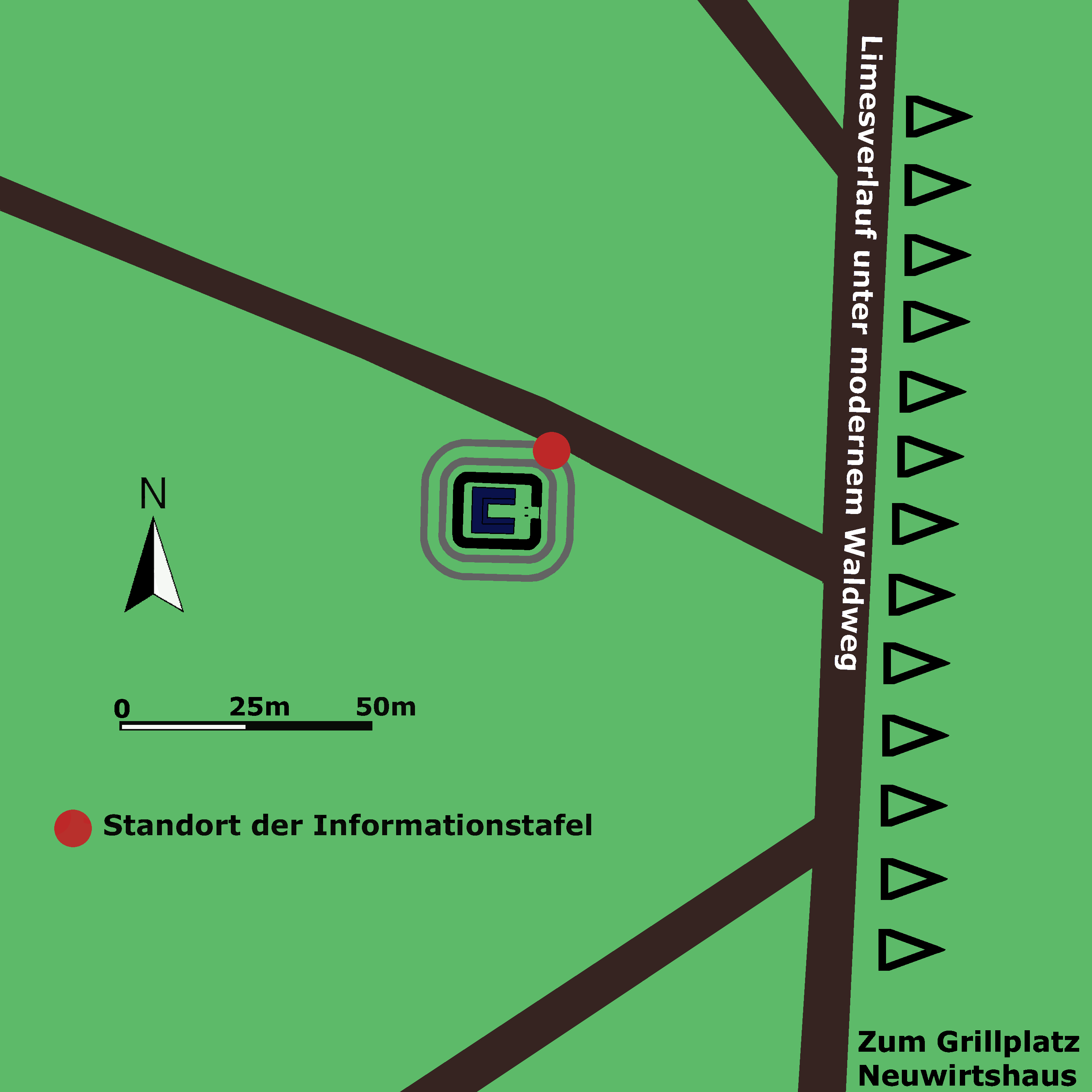 Kleinkastell Neuwirtshaus bei Hanau-Wolfgang, Hessen, Deutschland. Lageplan